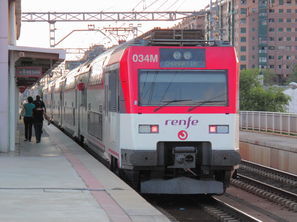 Un automotor de la serie 450 de Renfe, que realiza un servicio de Cercanías Madrid, en la estación de Vallecas, a punto de iniciar la marcha hacia Guadalajara.